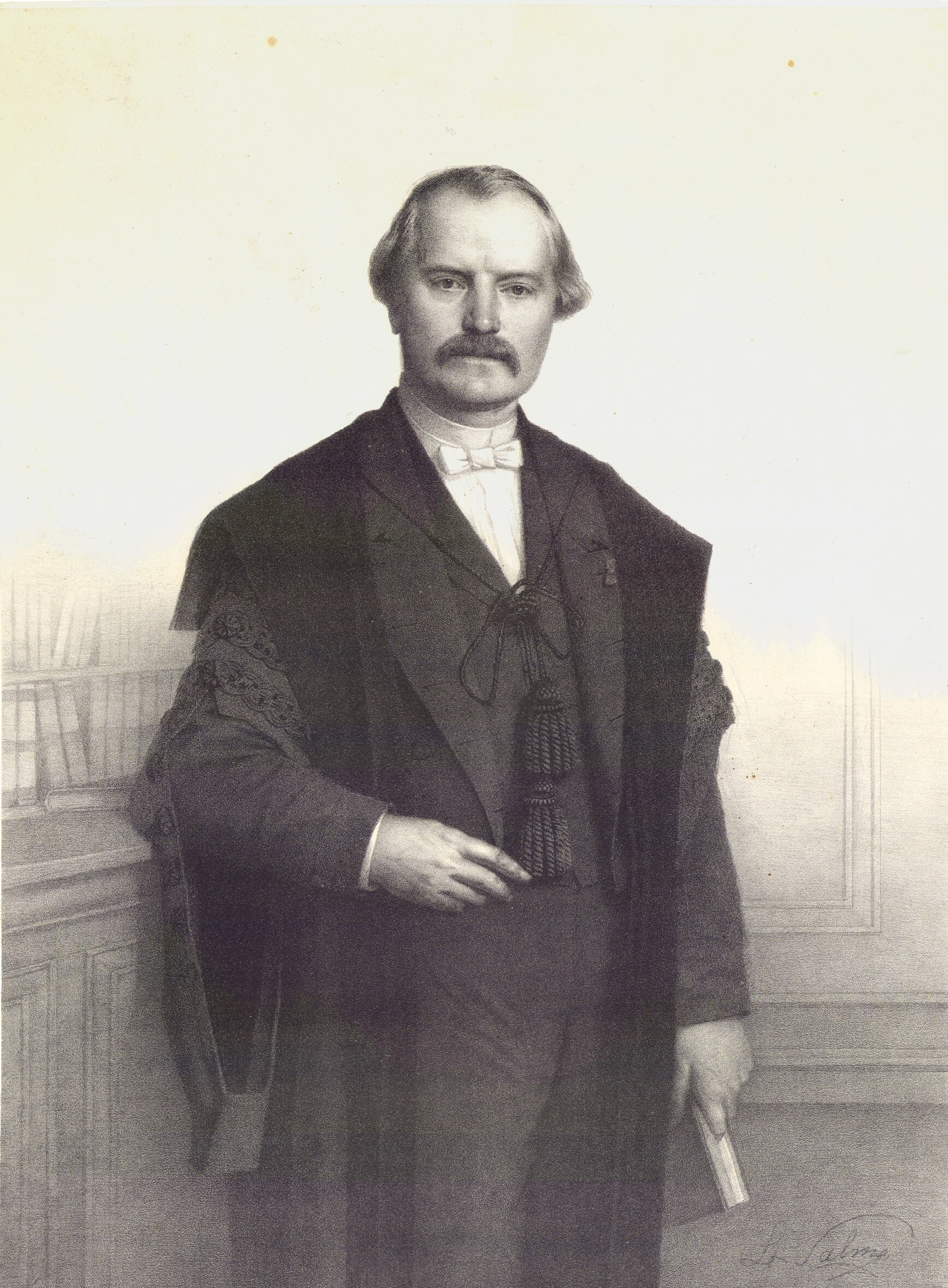 Litographie de Jean Stecher d'après un dessin de Lambert Salme.